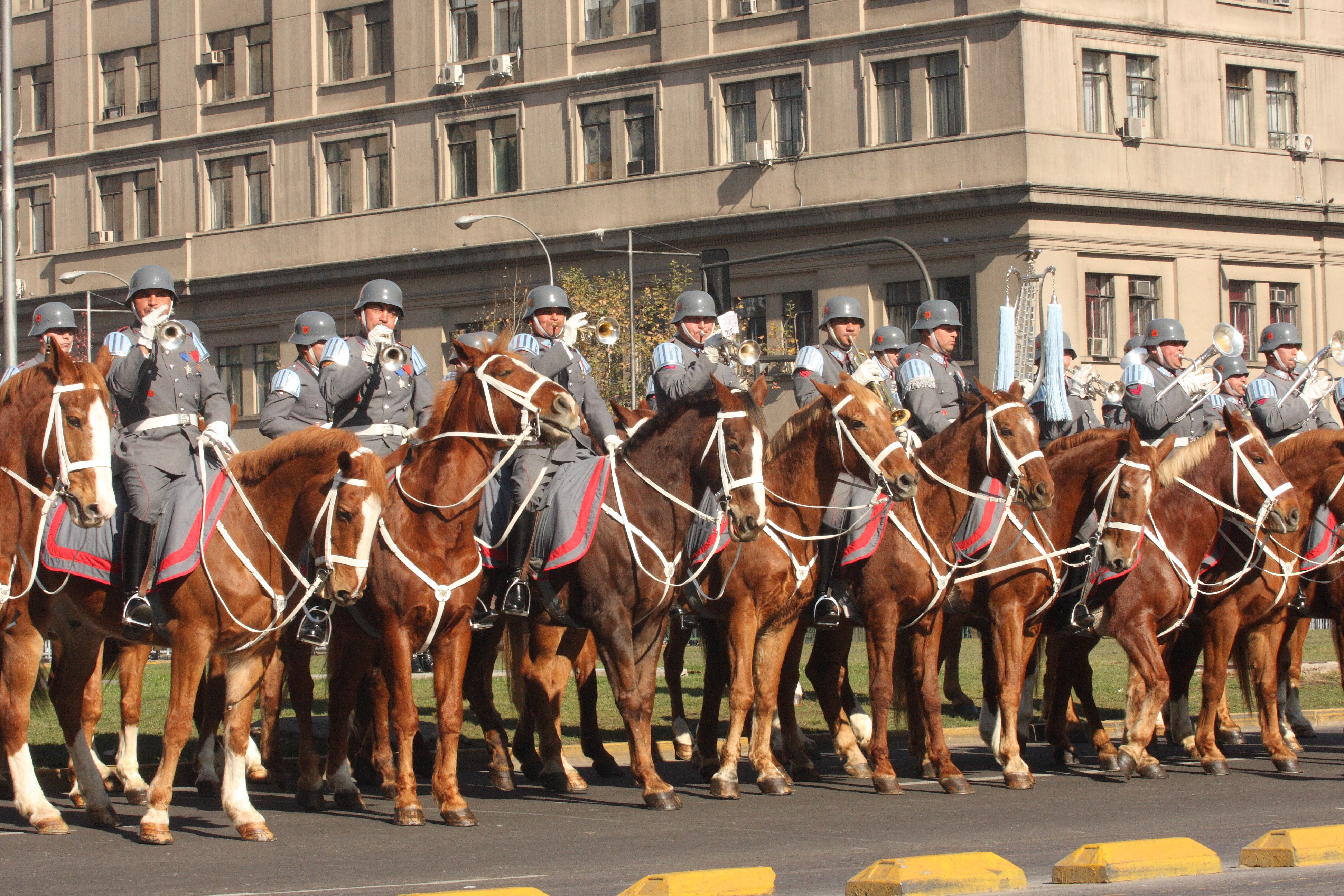 El batallón de Granaderos del Ejército de Chile, que son quienes acompañan al Presidente de la República en actos formales, como por ejemplo, la Cuenta Anual del 21 de Mayo.